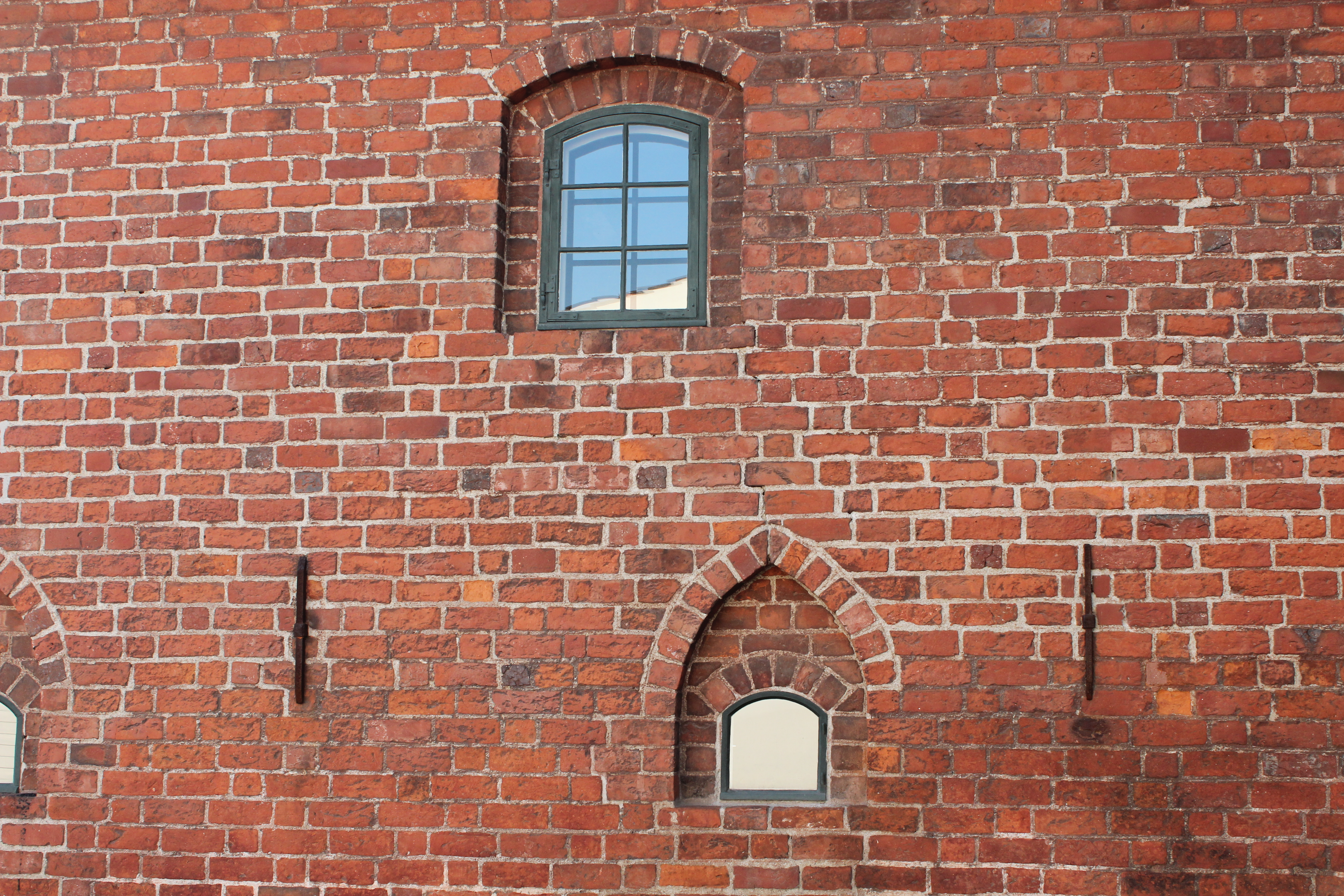 Vinduer i østsiden er bygningen.